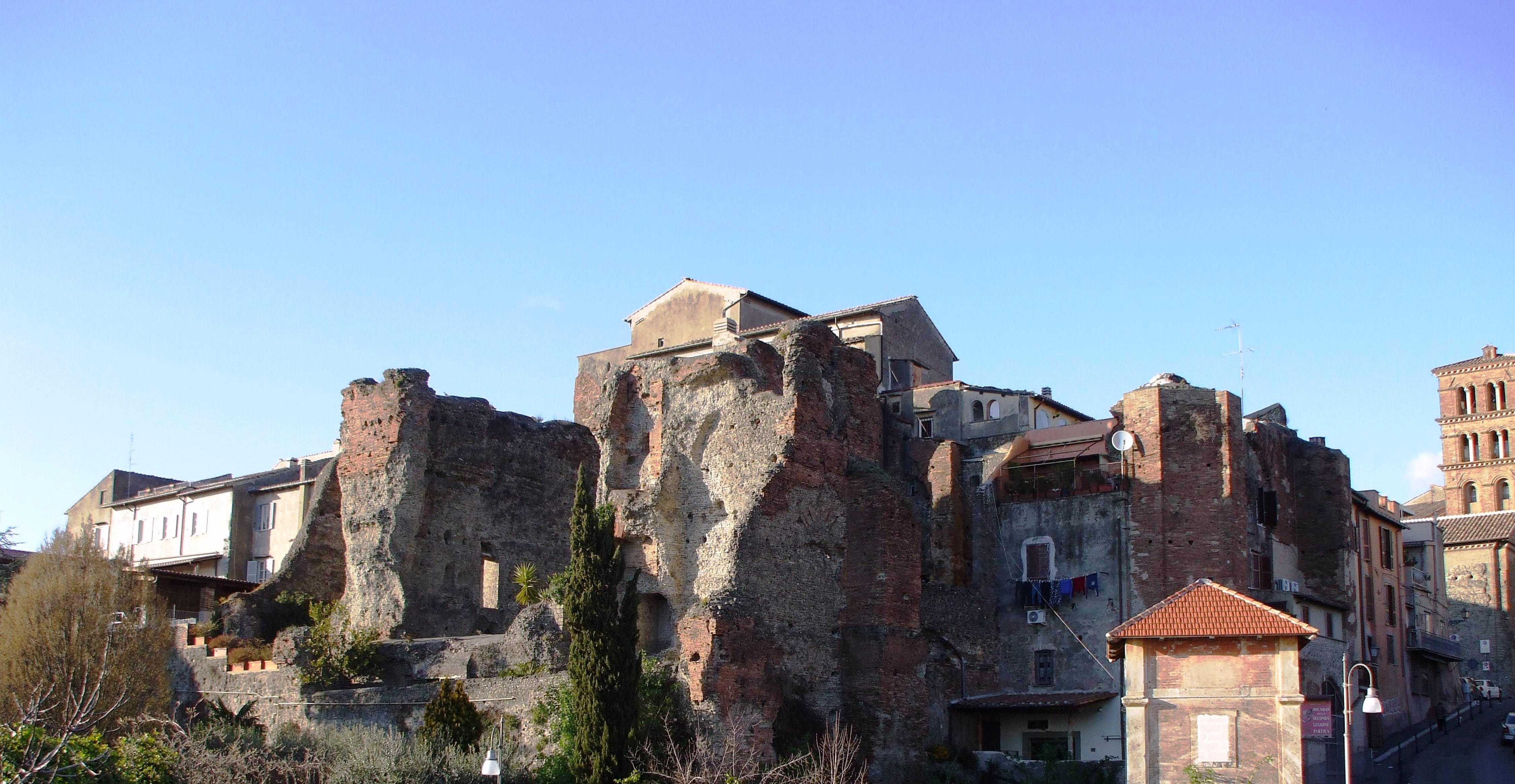 Albano Laziale - Le antiche terme romane di Cellomaio.